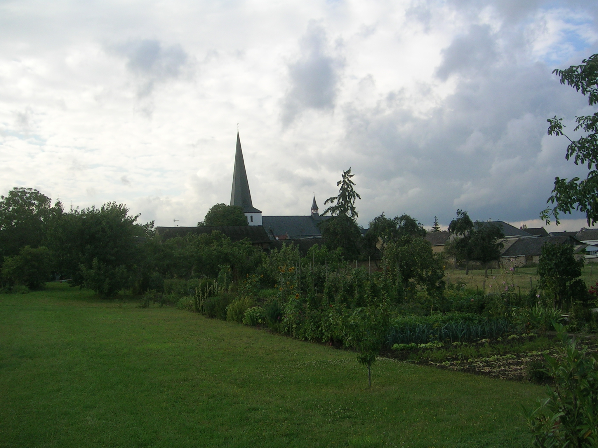 Bürvenich von Südwesten gesehen